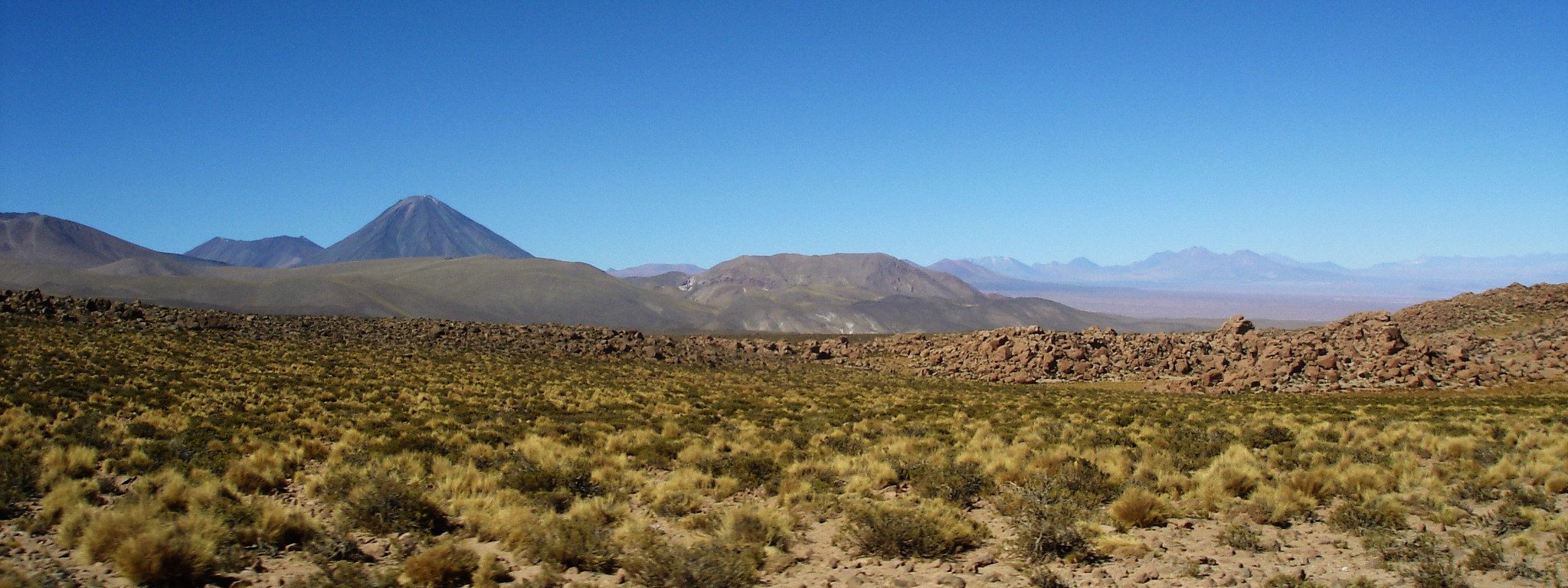 Altiplano chilien